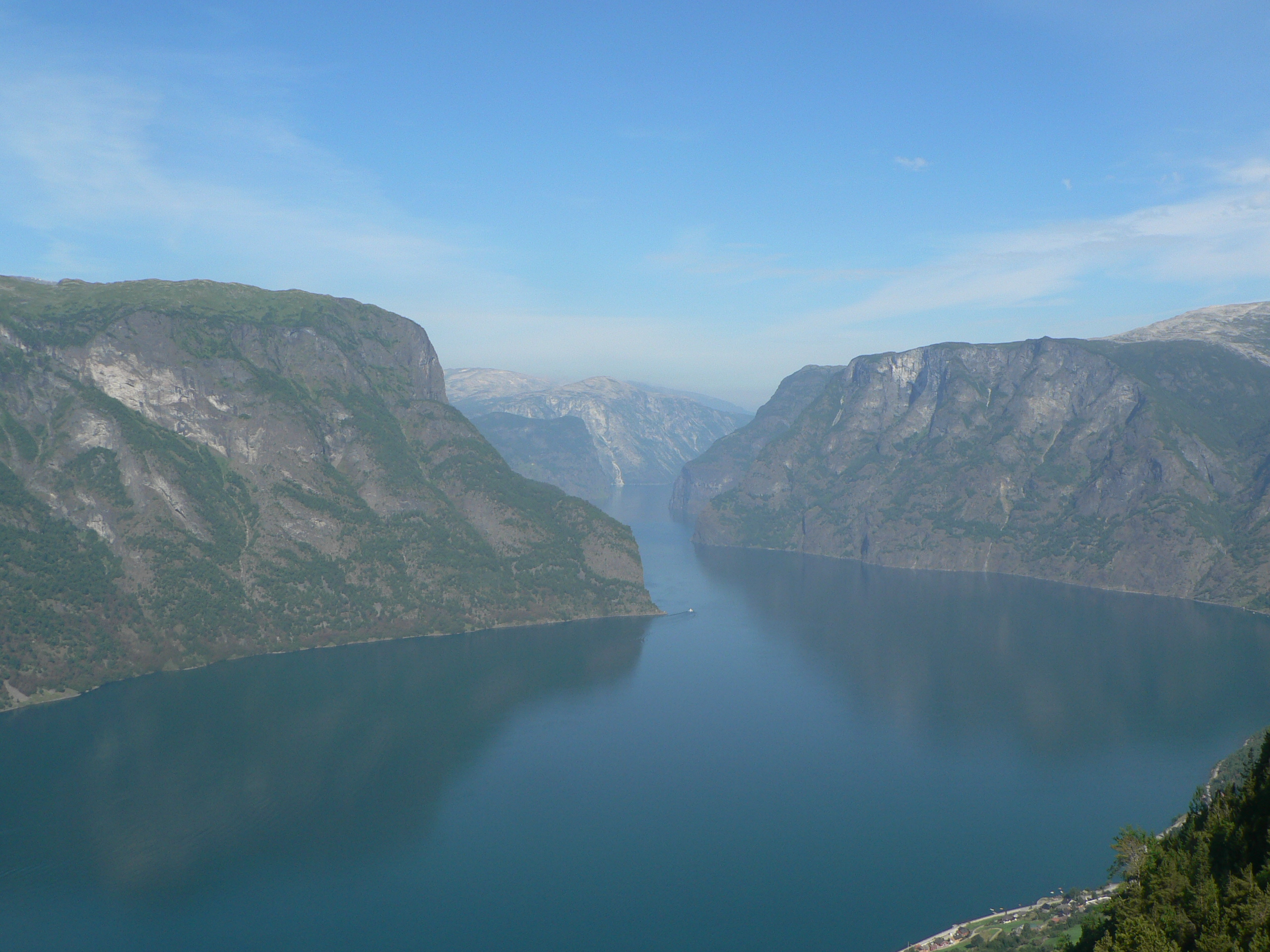 Aurlandsfjorden